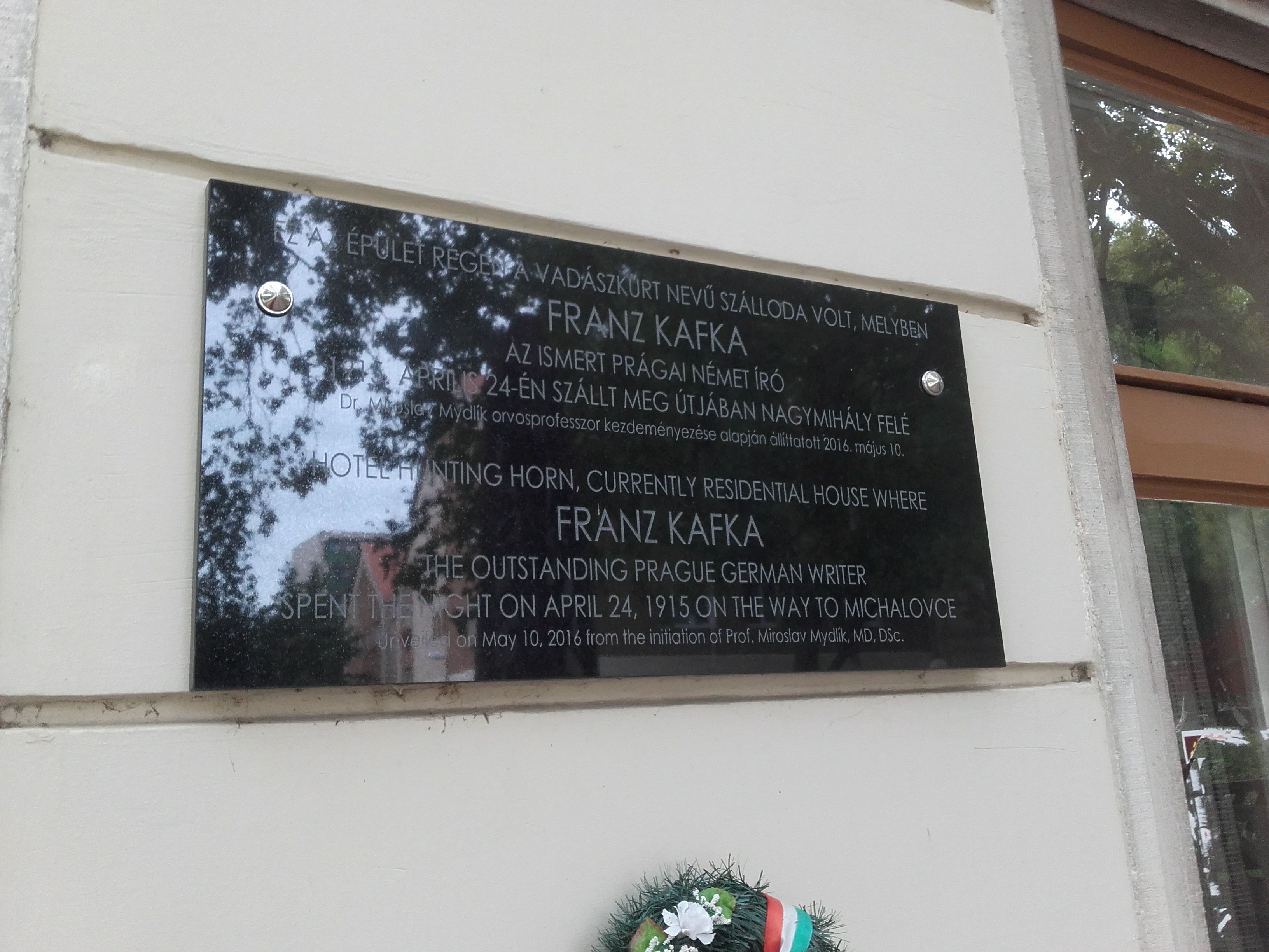 Az 1915-ben a városon átutazó Franz Kafka emléktáblája Sátoraljaújhelyen.